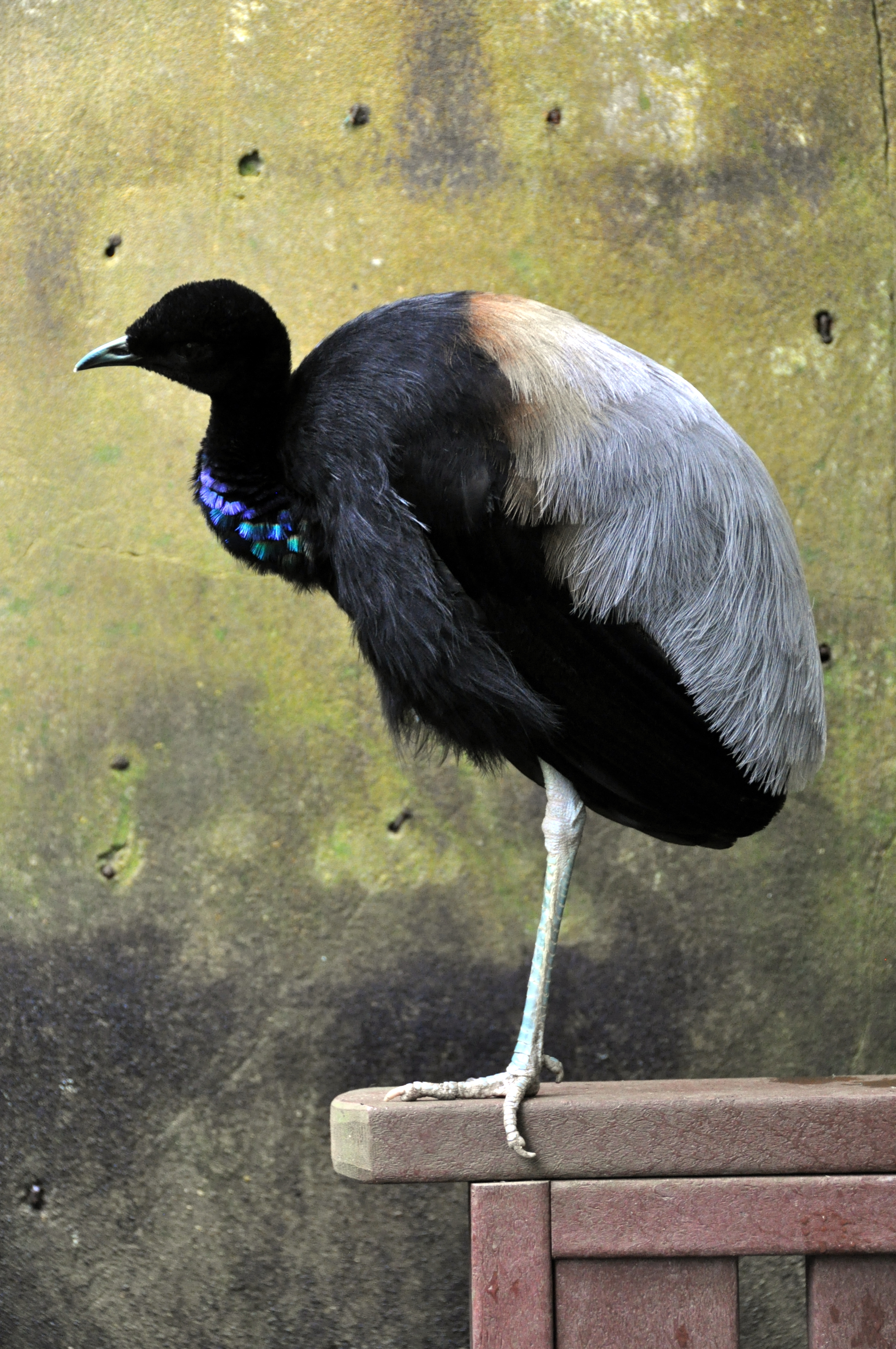 Psophia crepitans, captive; profile